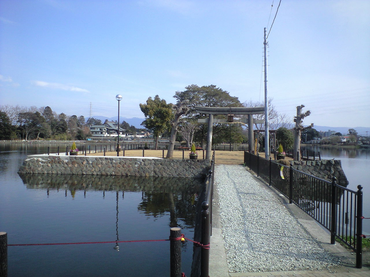 静岡県沼津市岡一色、門池（安政島）（1858年以降?）